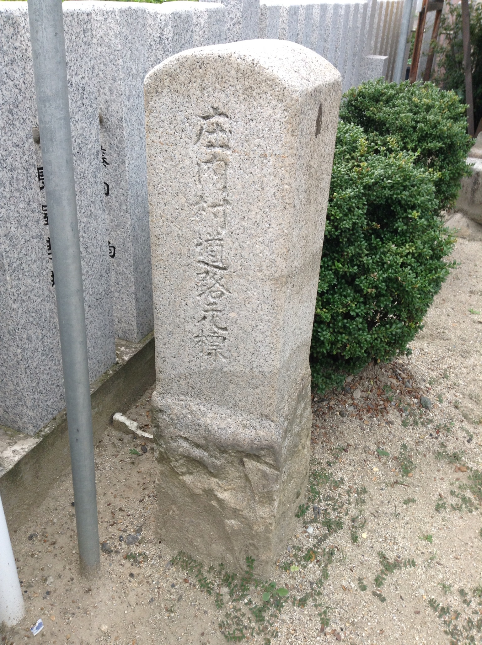 名古屋市西区庄内通の愛知県西春日井郡庄内村道路元標